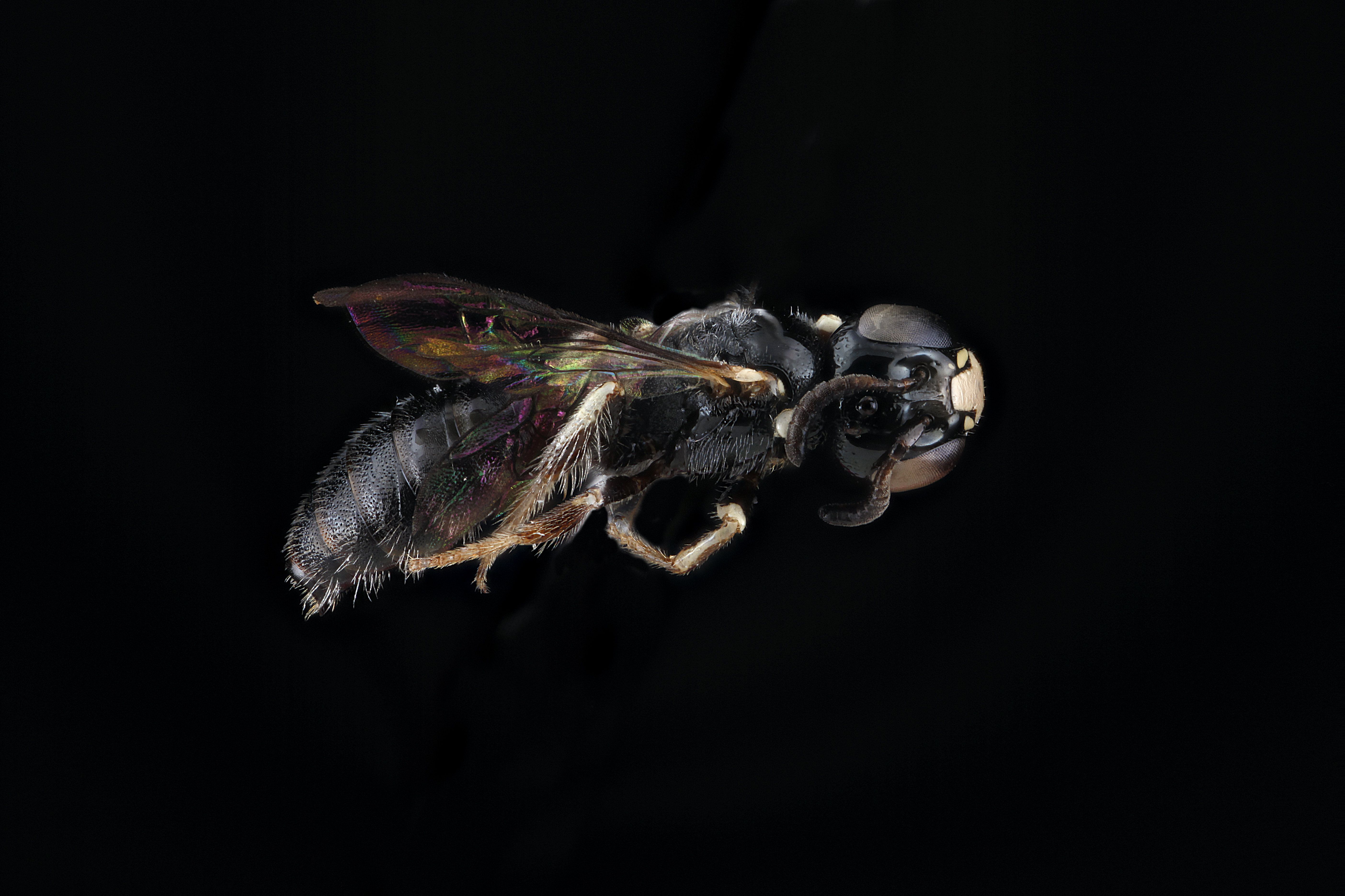 Ceratina cockerelli, male